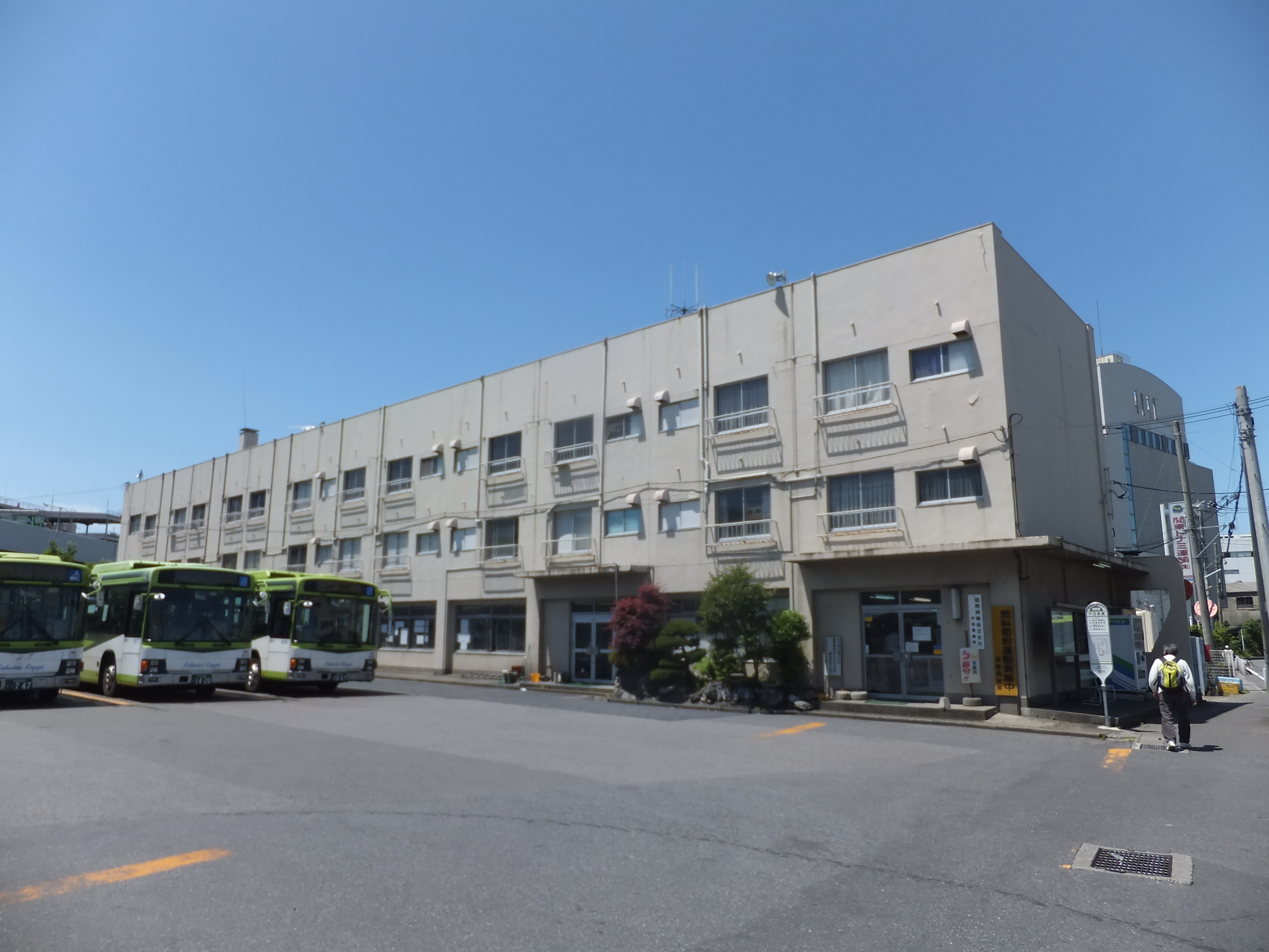 国際興業バス戸田営業所